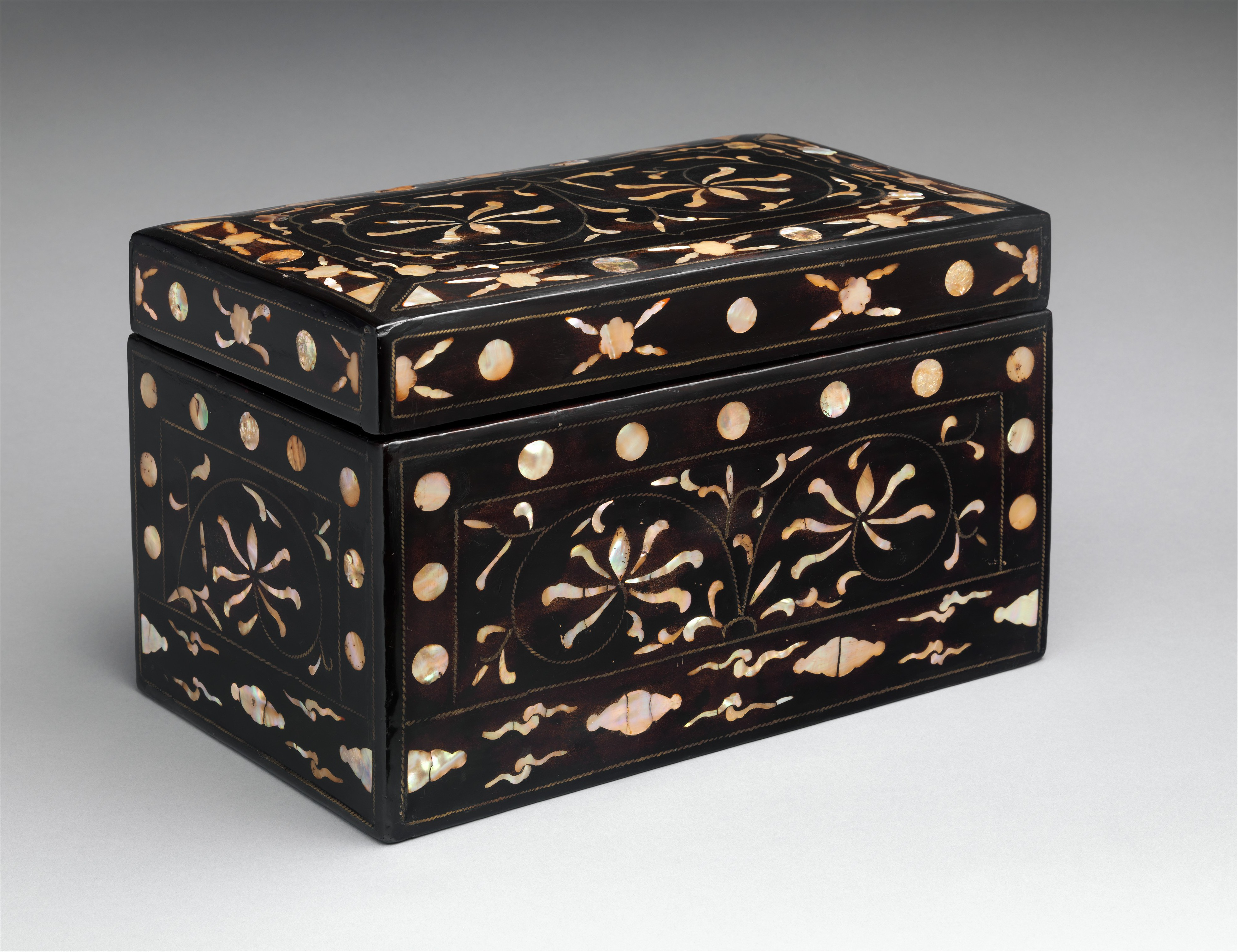 Korea; Box; Lacquer